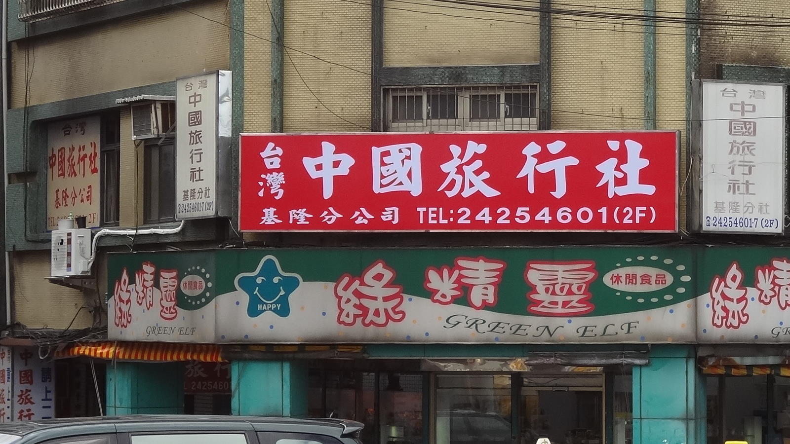 台灣中國旅行社基隆分公司，位於臺灣基隆市仁愛區孝一路65號2樓。